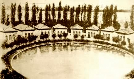 خانه های دور تا دور حوض کاخ عشرت آباد روبروی عمارت کلاه فرنگی عشرت آباد